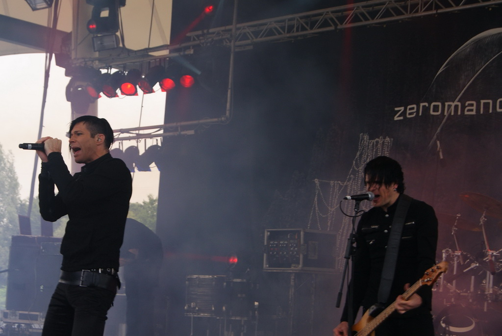 Kim Ljung und Alex Moklebust von Zeromancer auf dem Blackfield Festival 2010